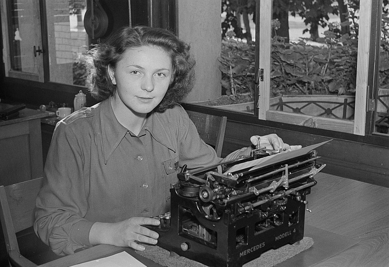 Original image description from the Deutsche Fotothek Porträt einer Frau an einer Schreibmaschine